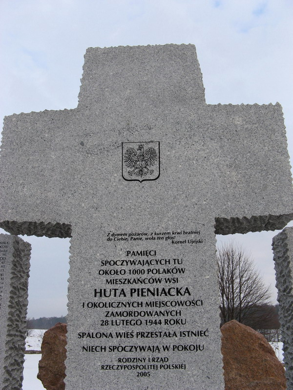 Pomnik poświęcony pamięci ponad 1000 Polaków zamordowanych przez 5 pułk policyjny SS i ukraińskie oddziały SS Galizien w Hucie Pieniackiej 28 lutego 1944 roku.